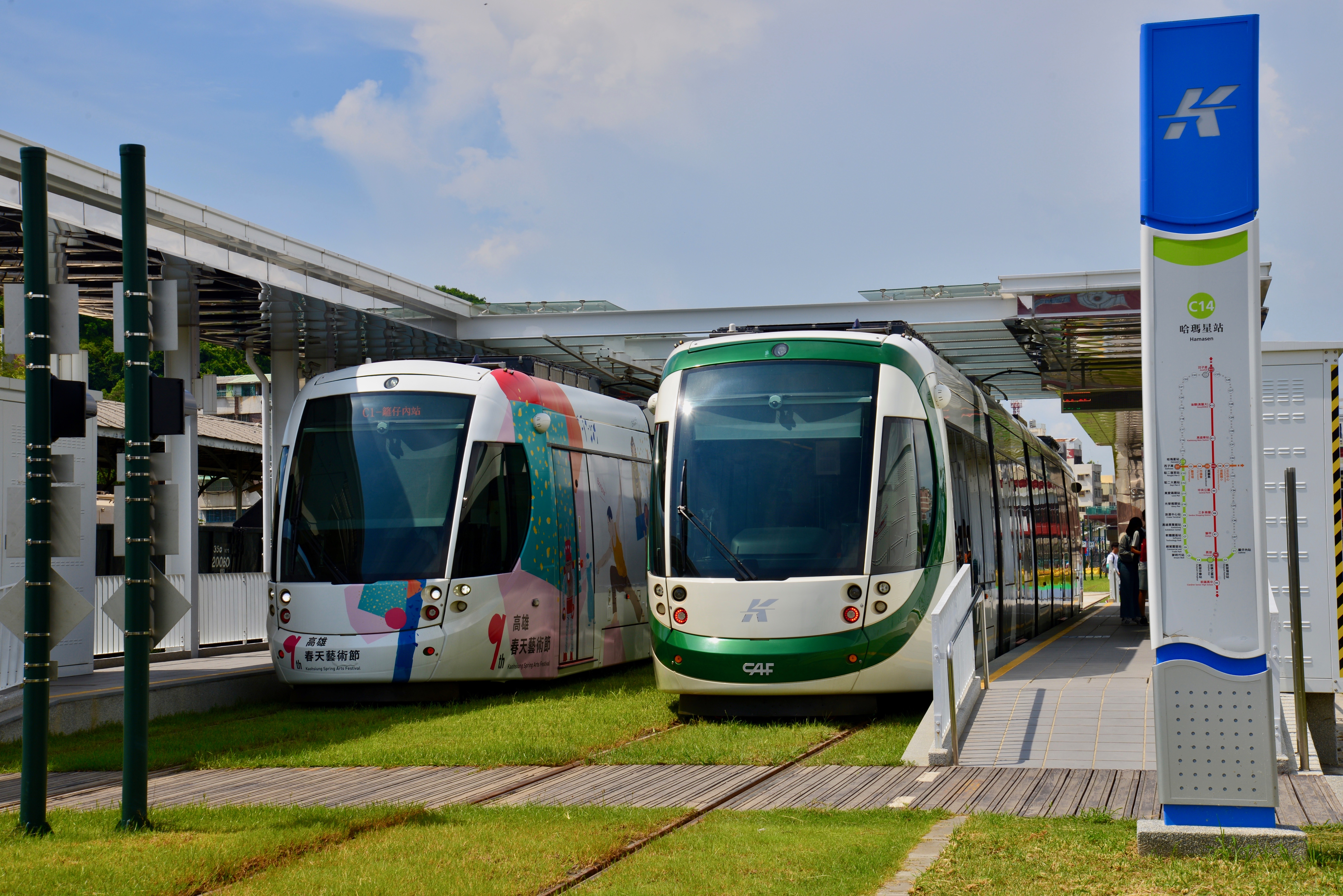 高雄捷運環状軽軌 哈瑪星駅